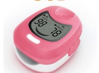 dedo